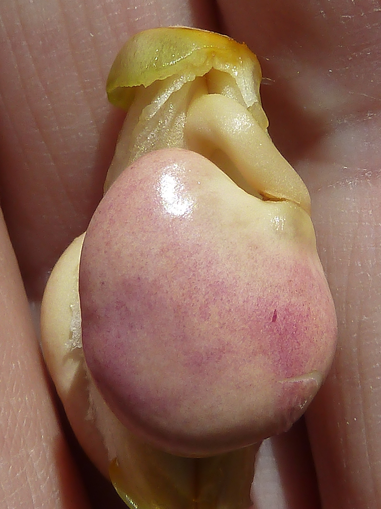 Acanthus mollis (Acanto): Semilla inmadura in situ en el interior de un fruto abierto - Parque del Buen Retiro, Madrid (España).